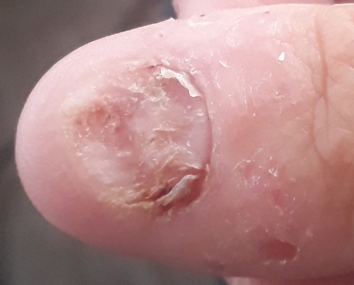 Pouce mangé